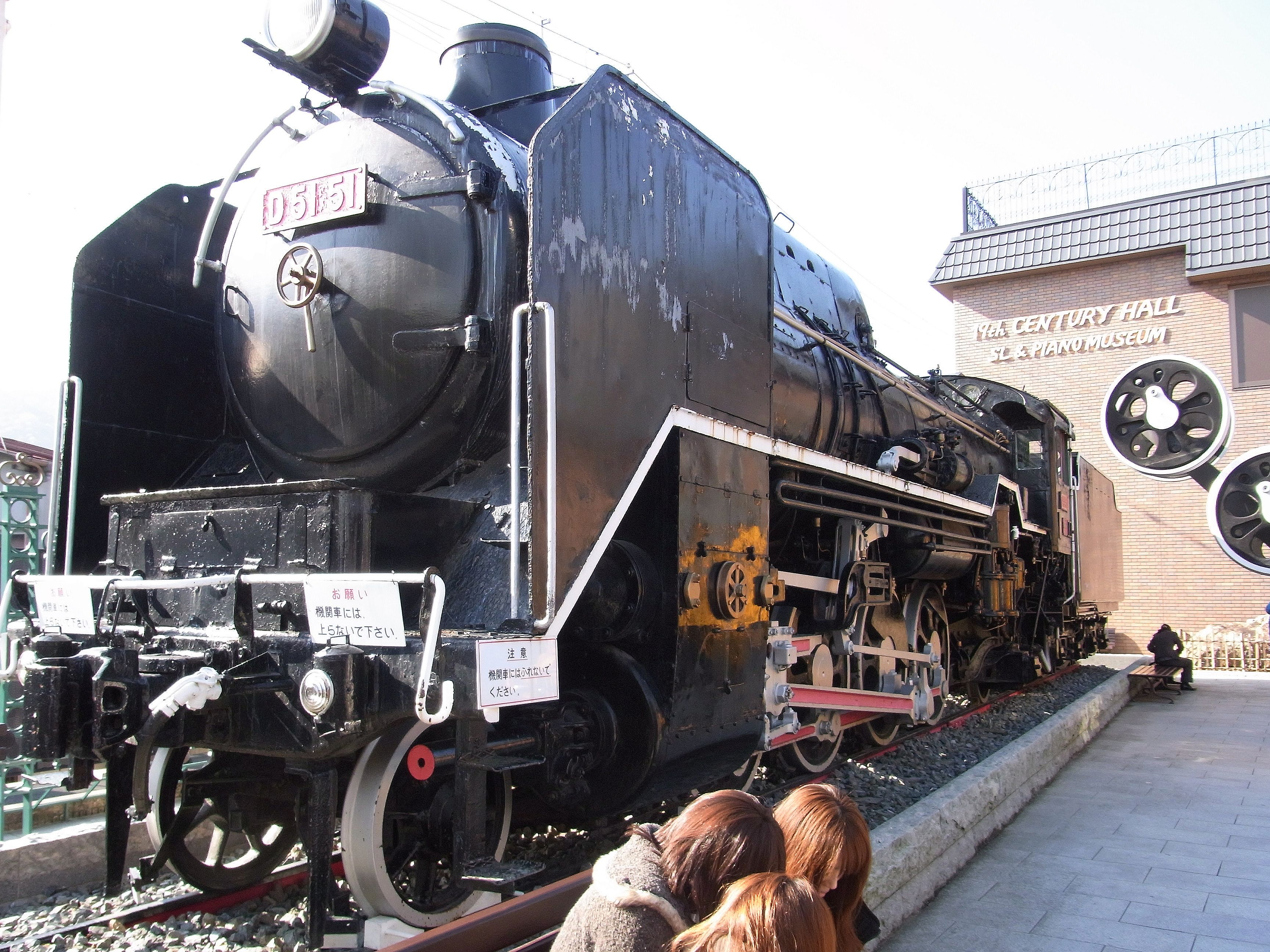 嵯峨嵐山駅のD5151